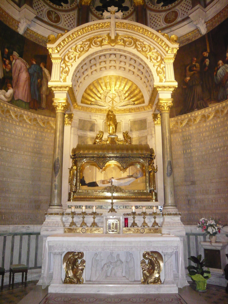 Chasse du Saint Curé d'Ars